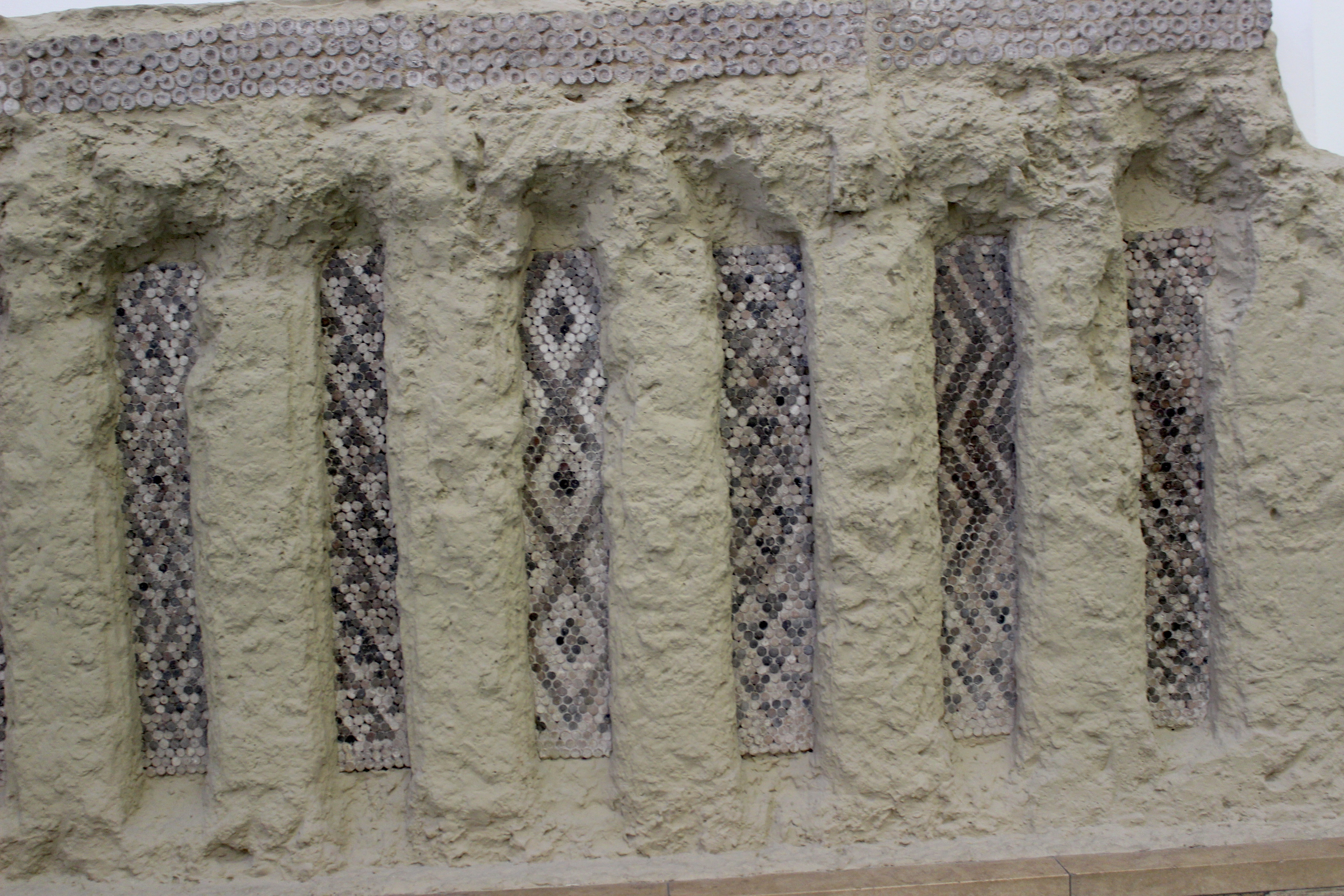 Berlín, decoración de conos de cerámica policromada de un templo.